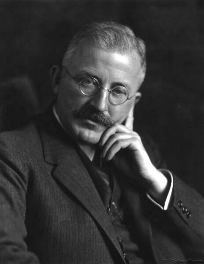 Porträt von Hermann Staudinger